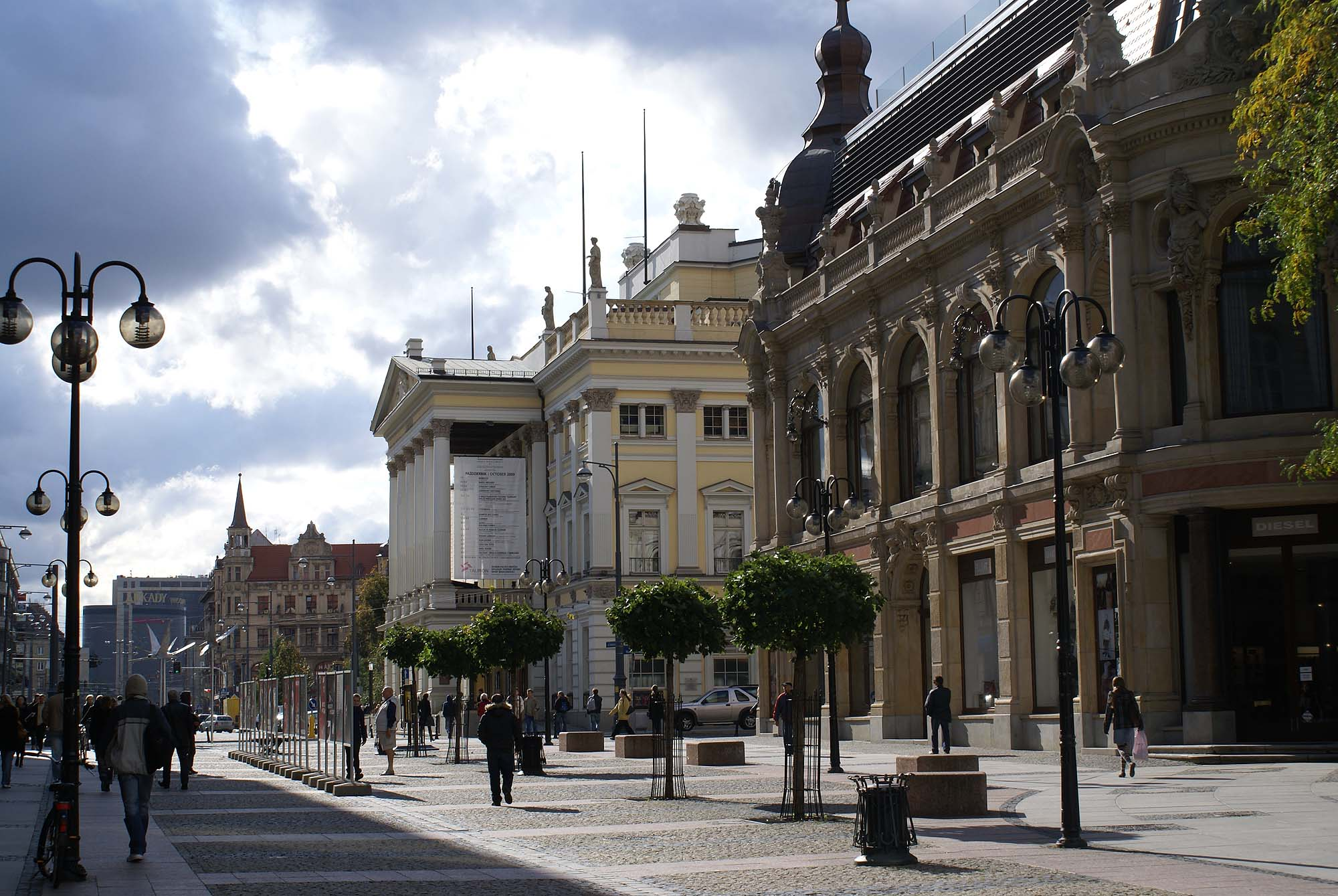 Wrocław, opera, 1837, 1871, 1955